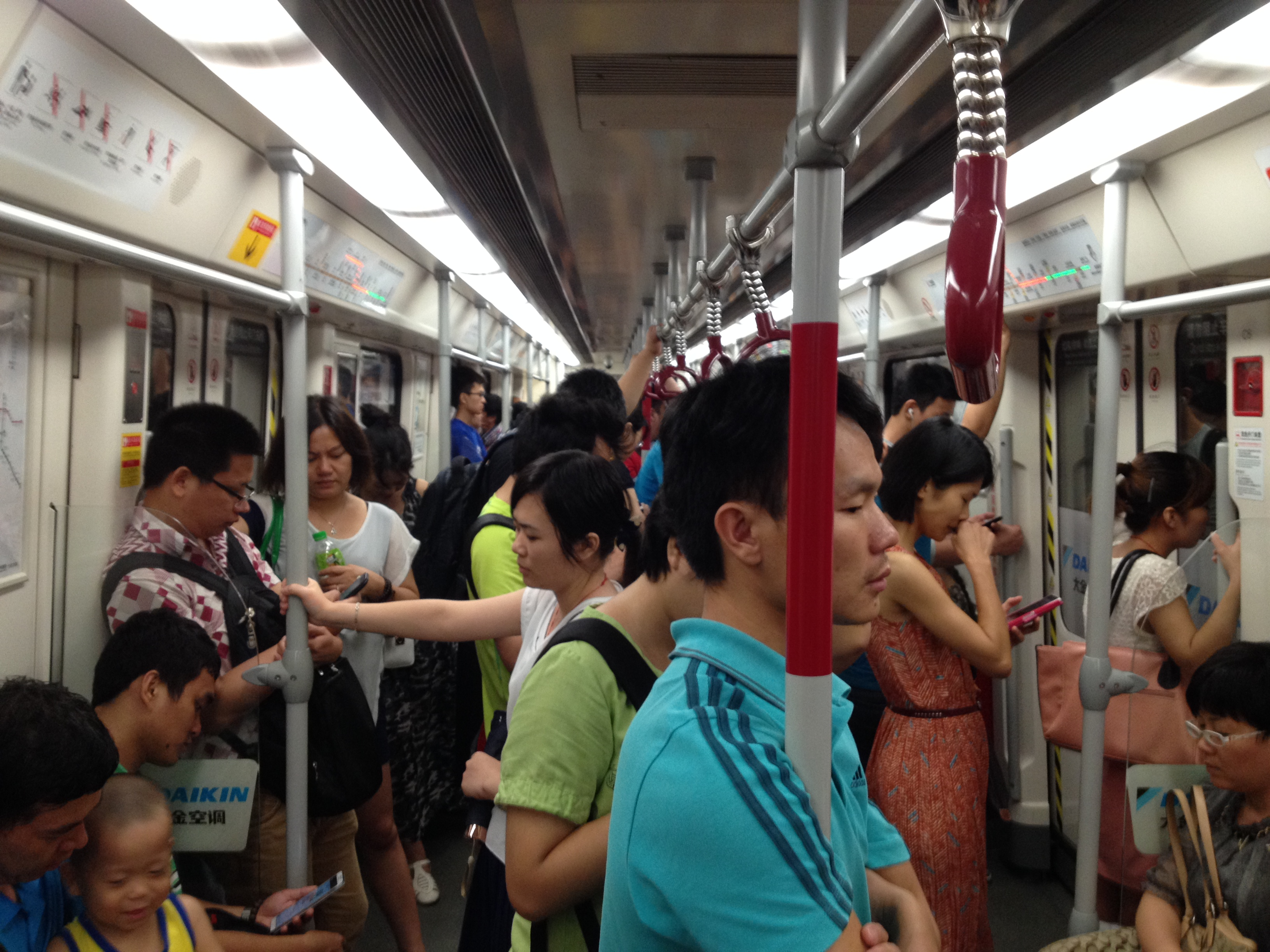 广州地铁3号线车内人潮